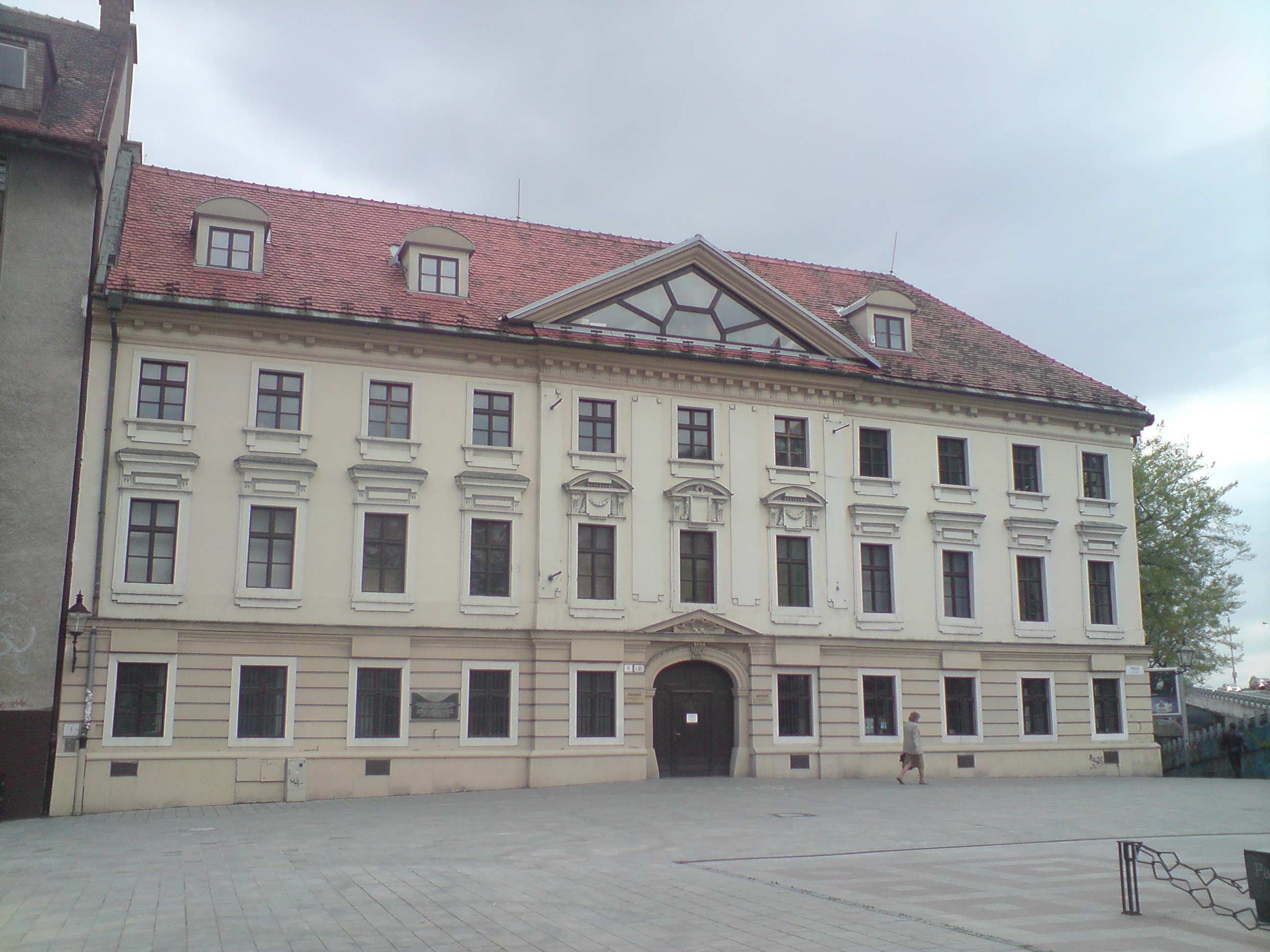 Bibiana, Bratislava